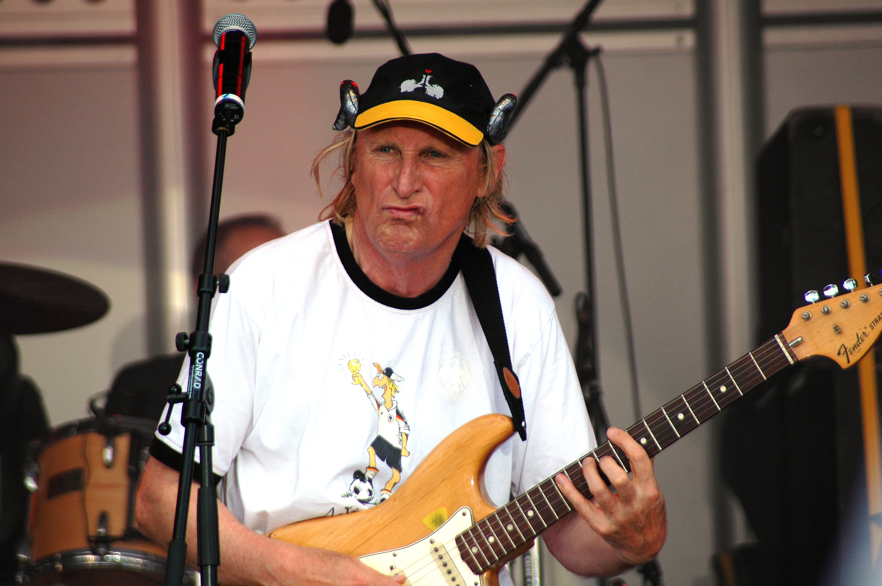 Otto Waalkes am 25.7.2010 in Parsdorf bei München